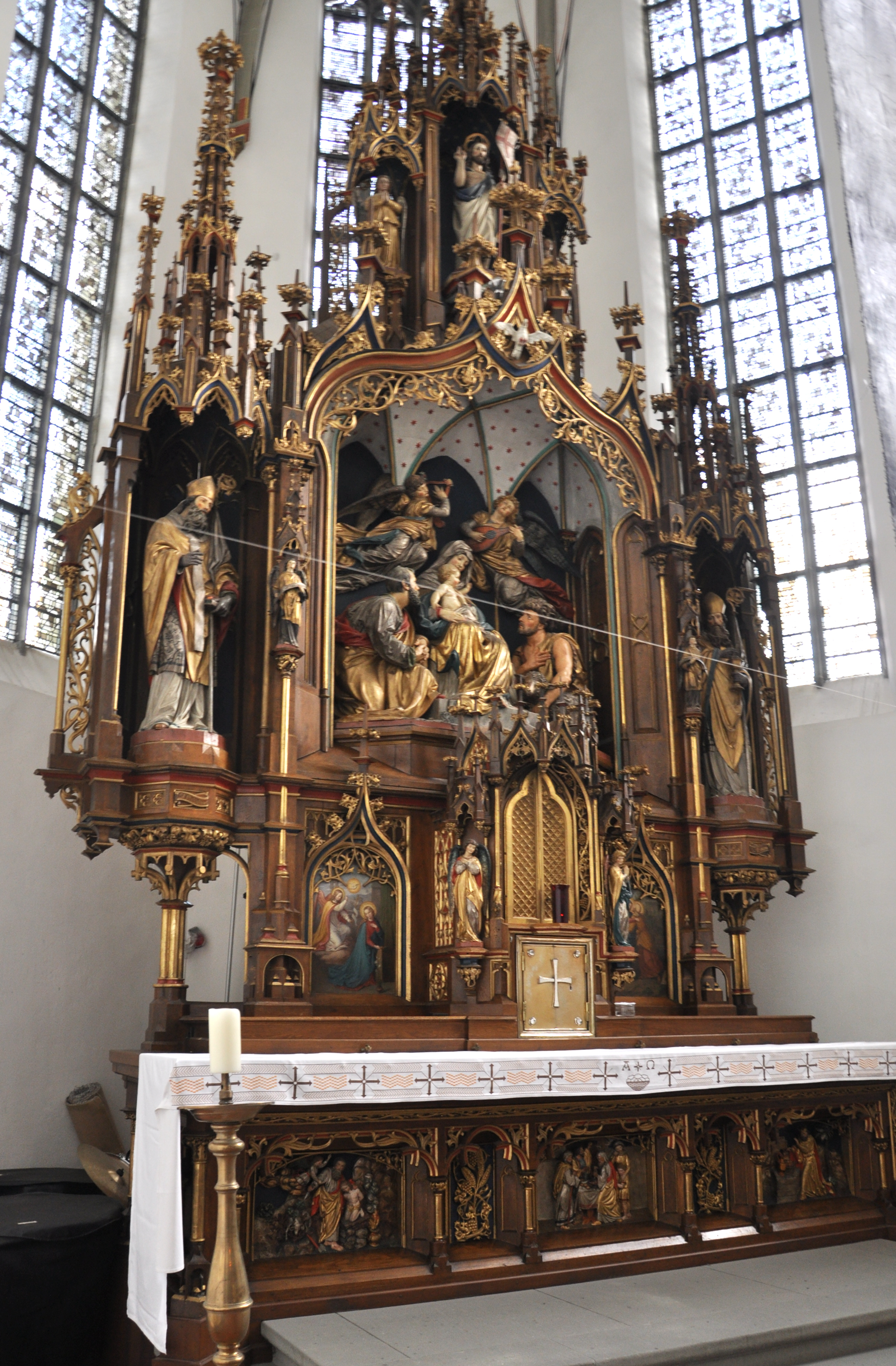 Hochaltar der Pfarrkirche St. Nikolaus, Markdorf (Bodenseekreis); 1871 von Karl Reihing, mit integrierter zentraler Skulpturengruppe „Geburt Christi“ von Prof. Geiger, München.